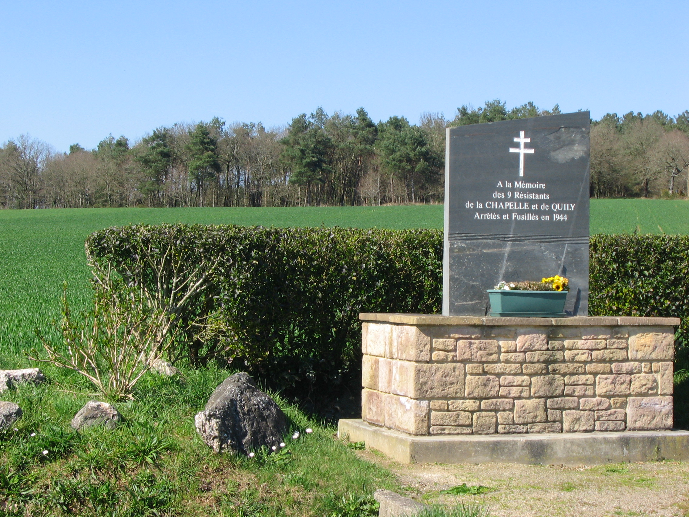 Monument commémoratif en hommage aux résistants qui furent fusillés à cet endroit. Texte : "À la mémoire des 9 Résistants de la CHAPELLE et de QUILY Arrêtés et Fusillés en 1944